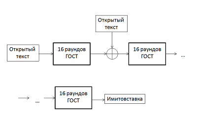 Схема режима выработки имитовставки ГОСТ 28147-89